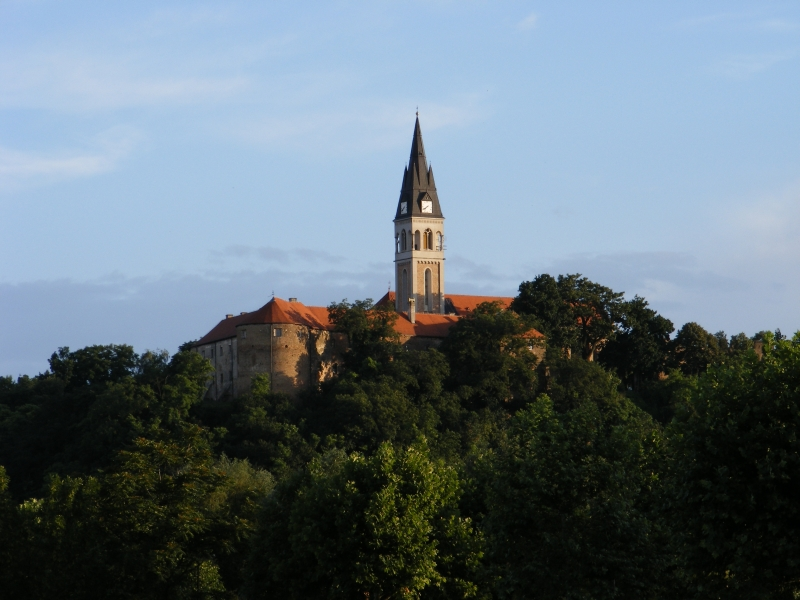 Tvrđava i samostan u Iloku